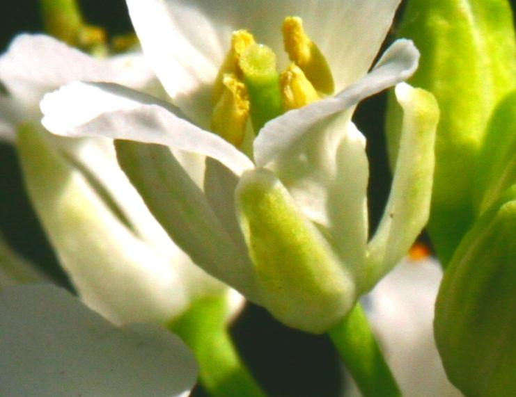 Alliaria petiolata